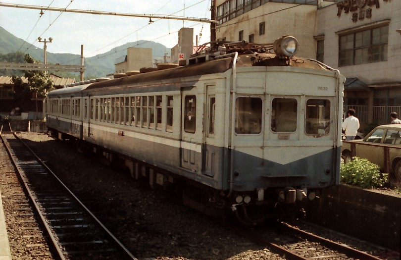 富士急行7000形電車。もと日本国有鉄道クモハ14形。